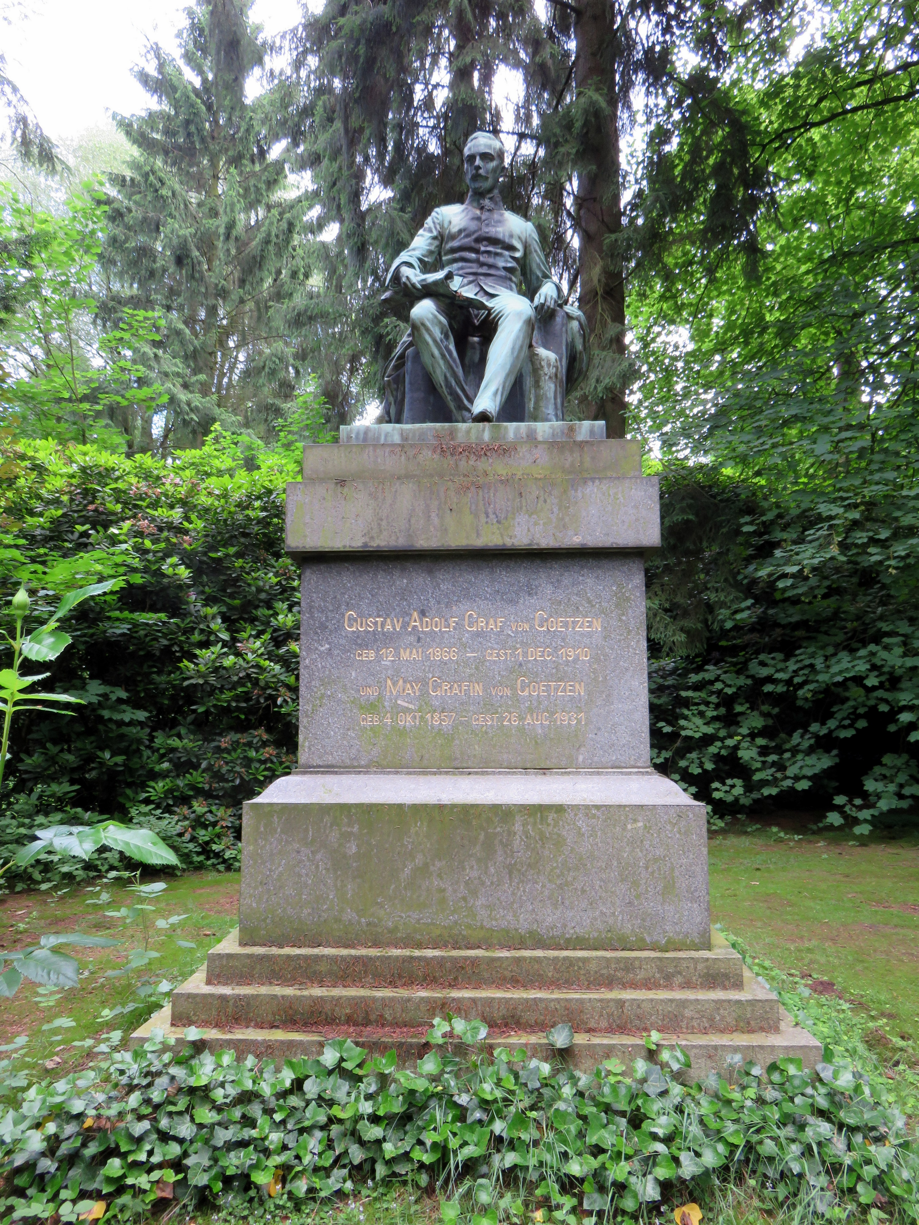 Bronze Grabmal für den deutschen Gouverneur und Ostafrikaforscher Gustav Adolf von Götzen des deutschen Bildhauers Gustav Eberlein von 1913, Hamburger Friedhof Ohlsdorf.